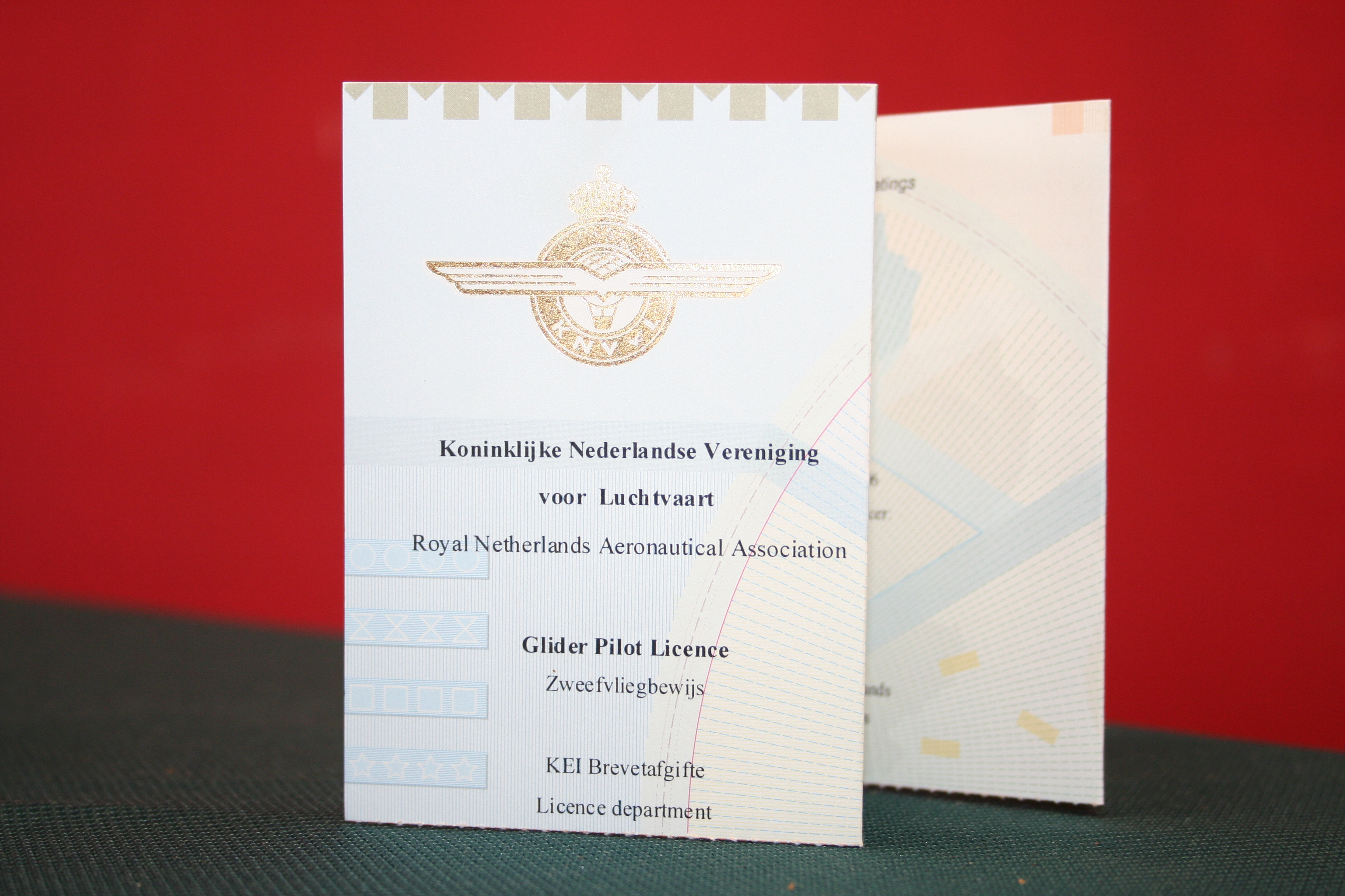 Zelf gemaakte foto van een GPL (zweefvlieg brevet).